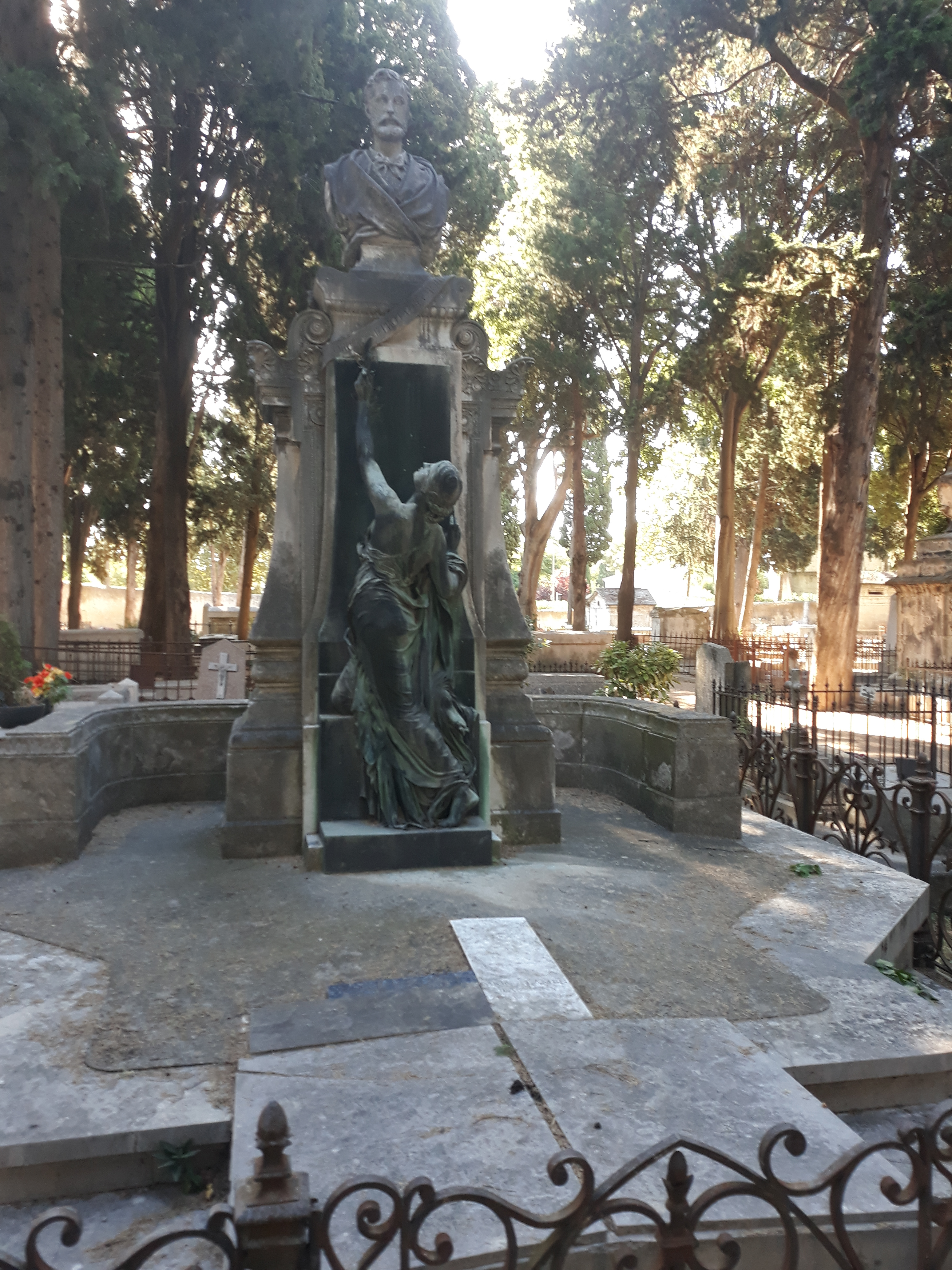 Das Familiengrab Bazille auf dem protestantischen Friedhof Montpellier, darunter der Politiker Gaston Bazille und der Male Frederic Bazille.